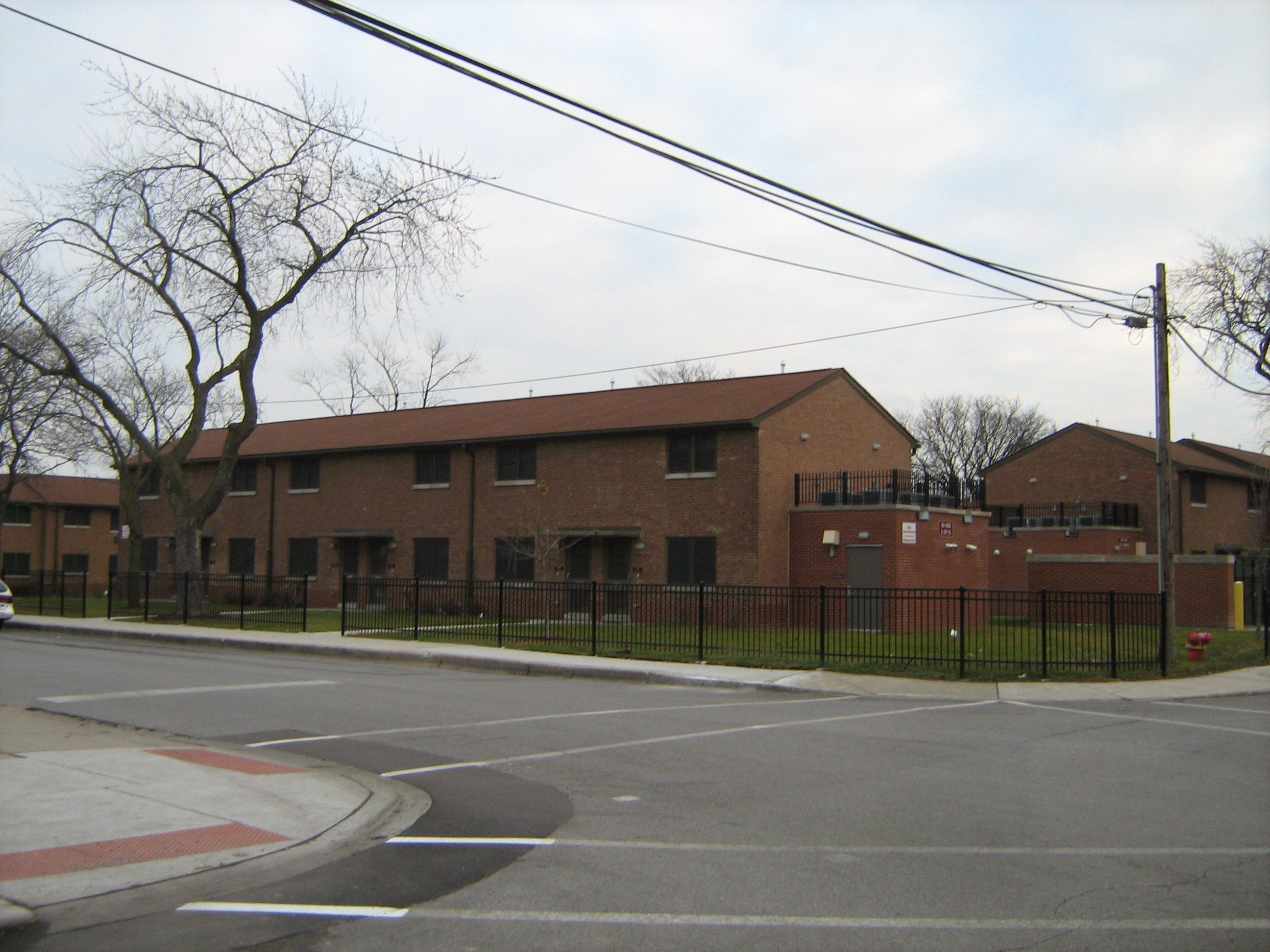 Altgeld Gardens